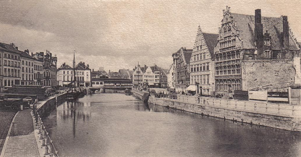 De Korenlei voor 1913, oude postkaart